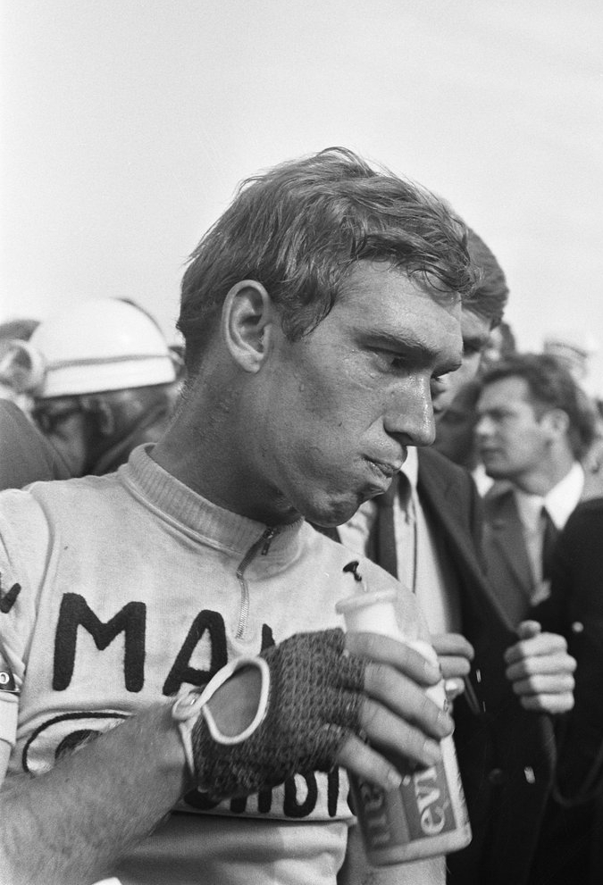 Nederlands kampioenschap wielrennen op de weg te Beek; Jacques Frijters direct na de finish.